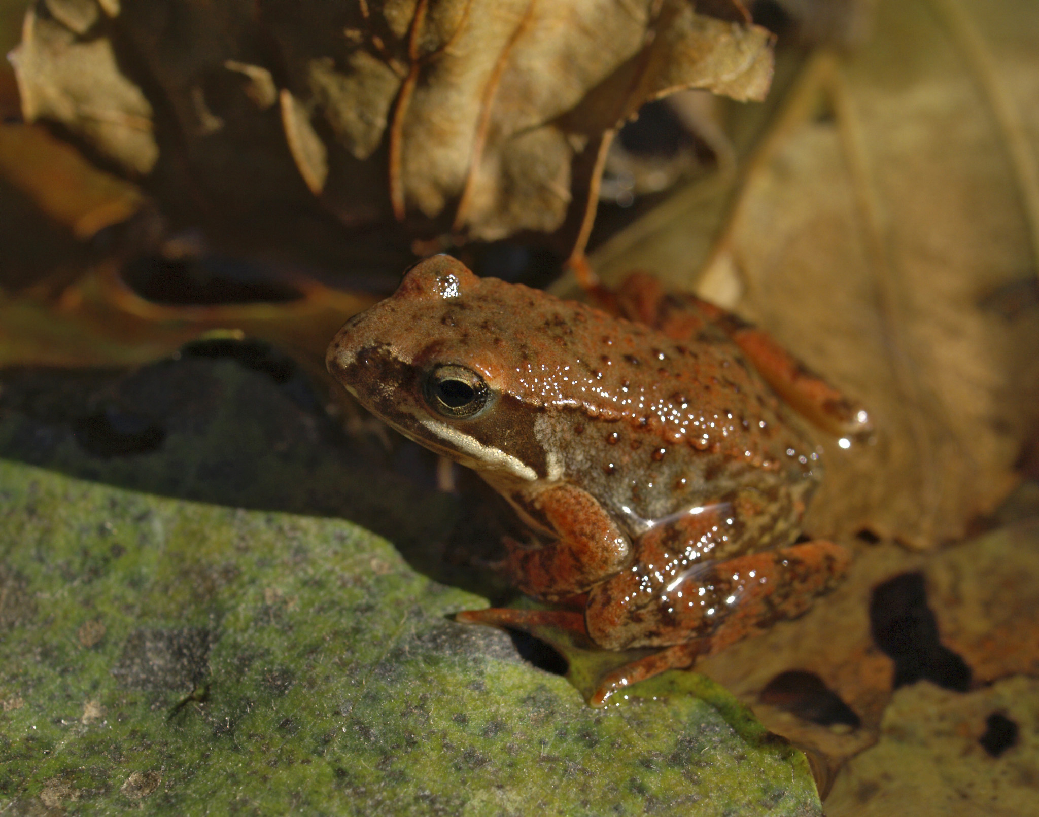 Ejemplar juvenil de rana patilarga (Rana iberica). Garganta del Vadillo, Losar de la Vera (Cáceres, España). 11-noviembre-2007.